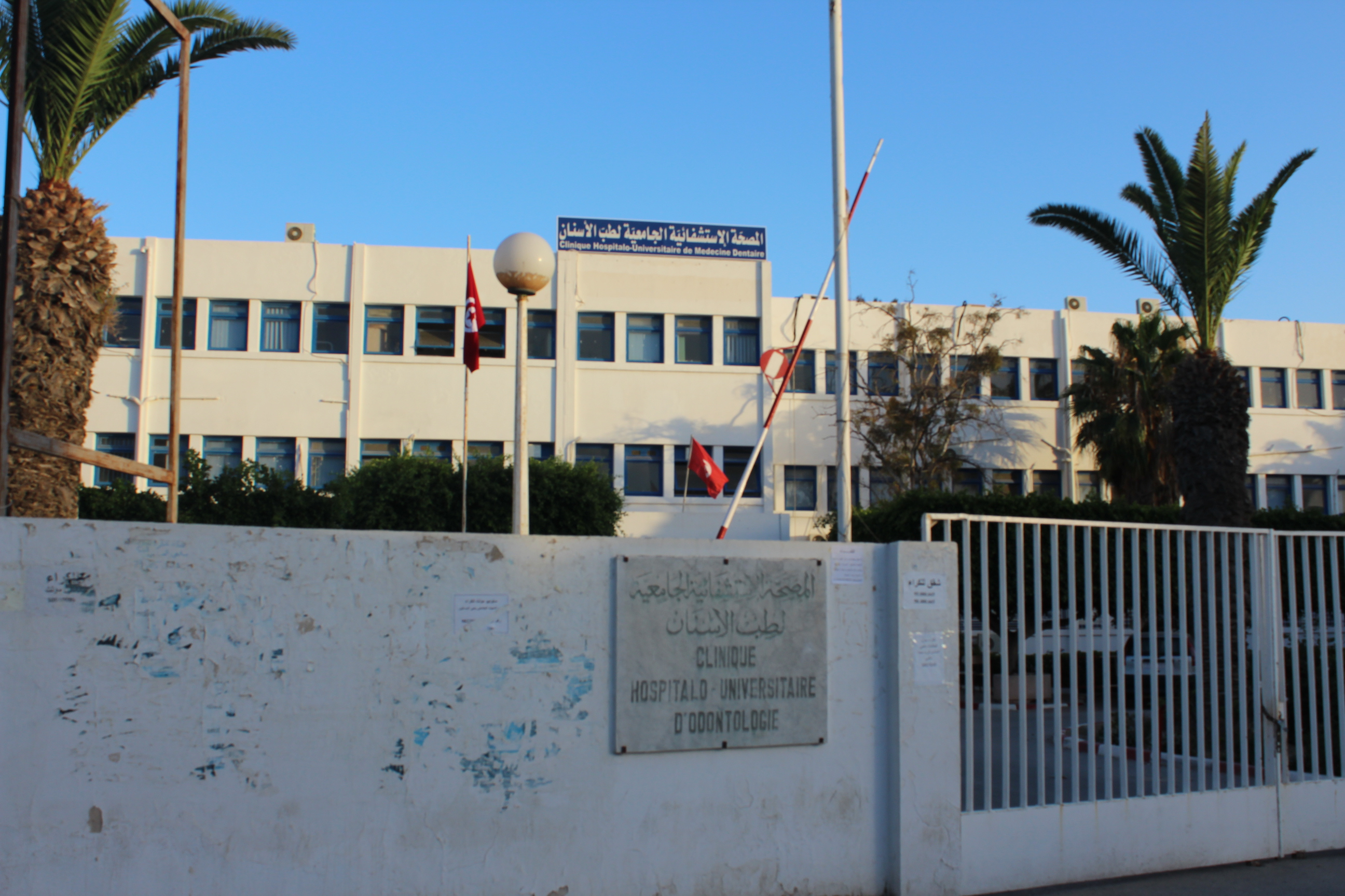 Monastir, Tunisie المنستير، تونس